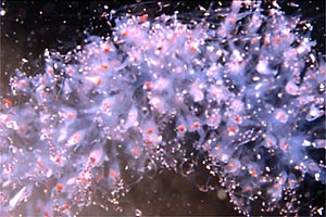 Forskalia